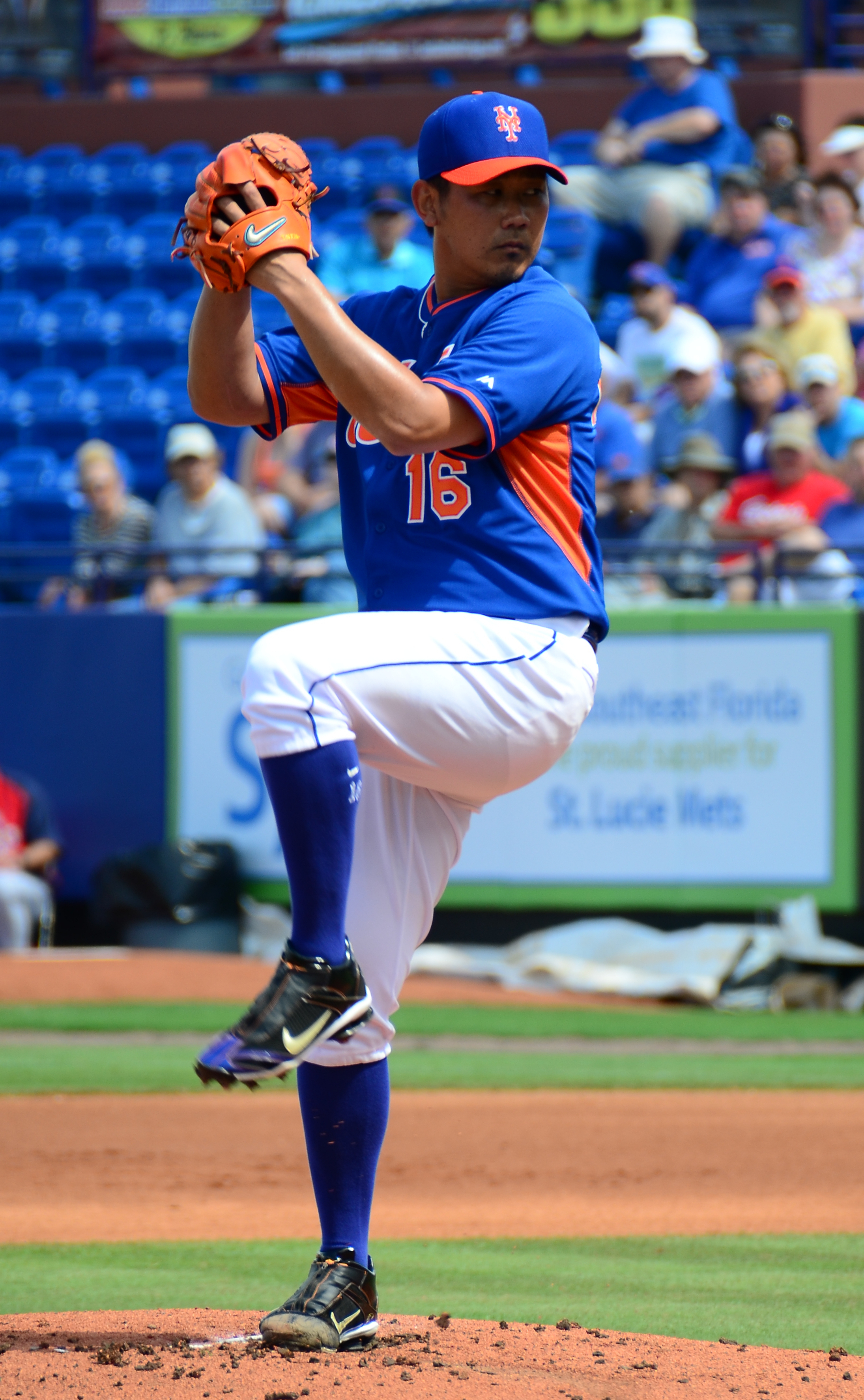 Daisuke Matsuzaka